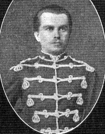 Владимир Николаевич Роговцев (Роговцов), щабс-ротмистър 8-ми хусарски Лубенски полк, убит на 18 август 1877 г. край с. Посабина.